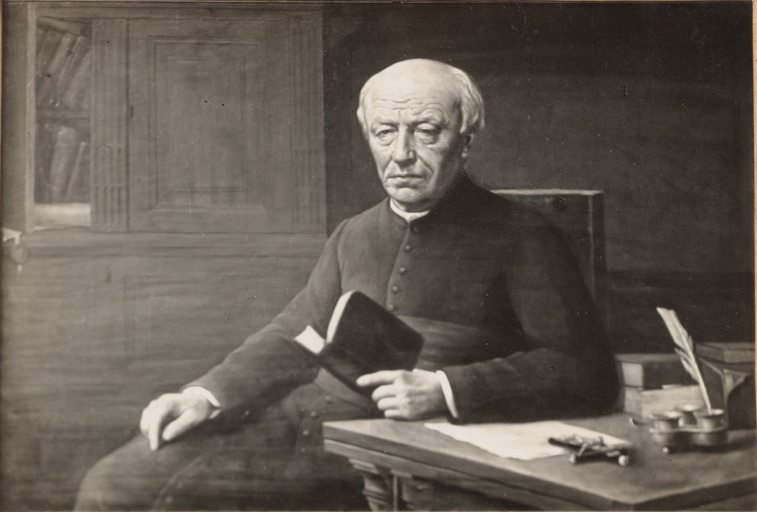 Schilderij met Guido Gezelle door de Brugse schilder Hendrik De Graer (1856-1915), vervaardigd in 1905.